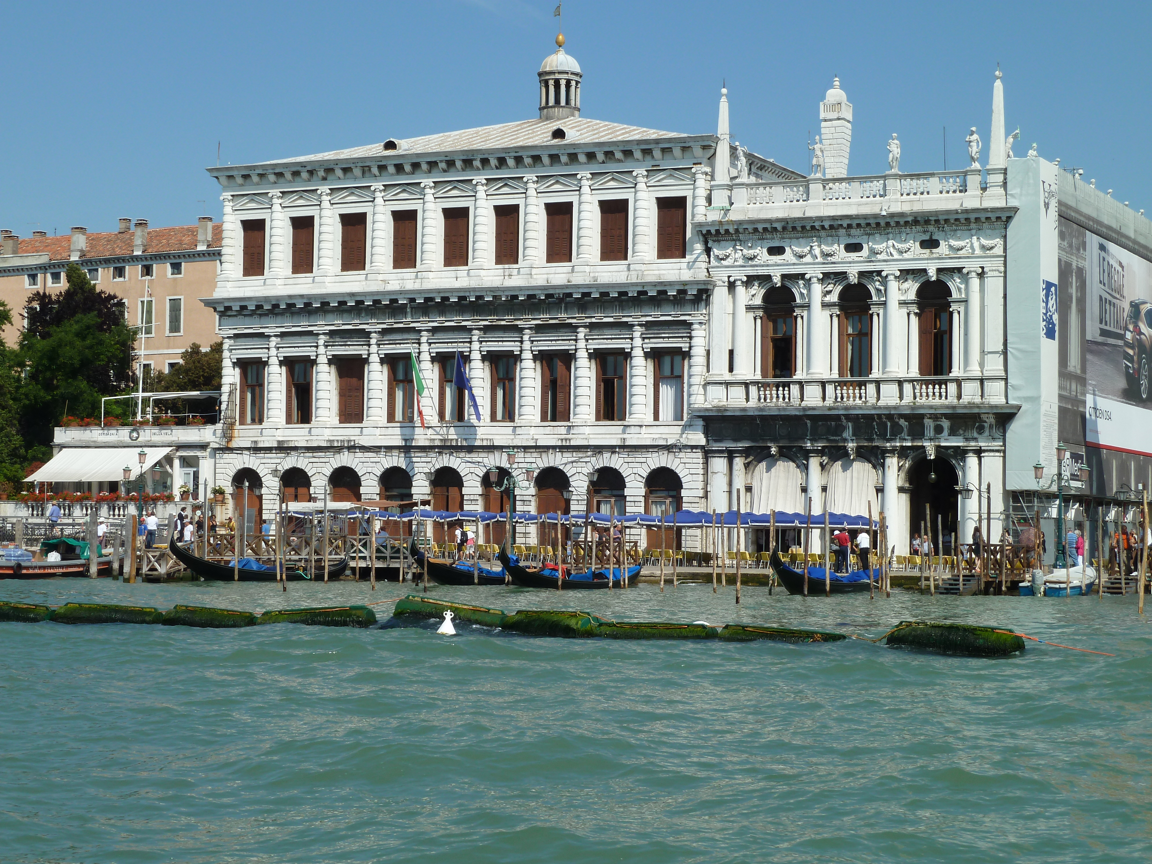 Zecca (Venice)